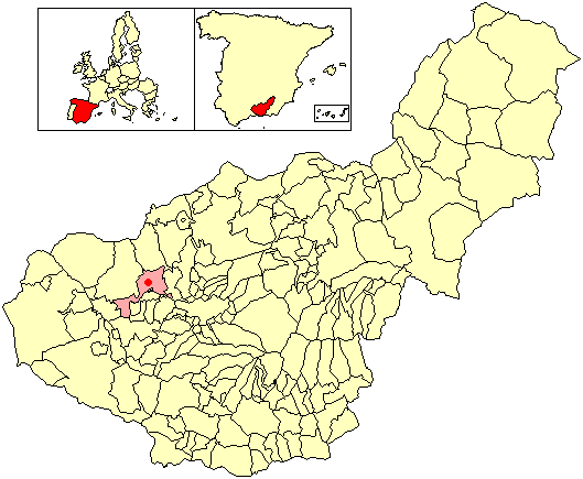 Situación de la localidad de Zujaira (en el municipio de Pinos Puente) respecto a la provincia de Granada, en España.